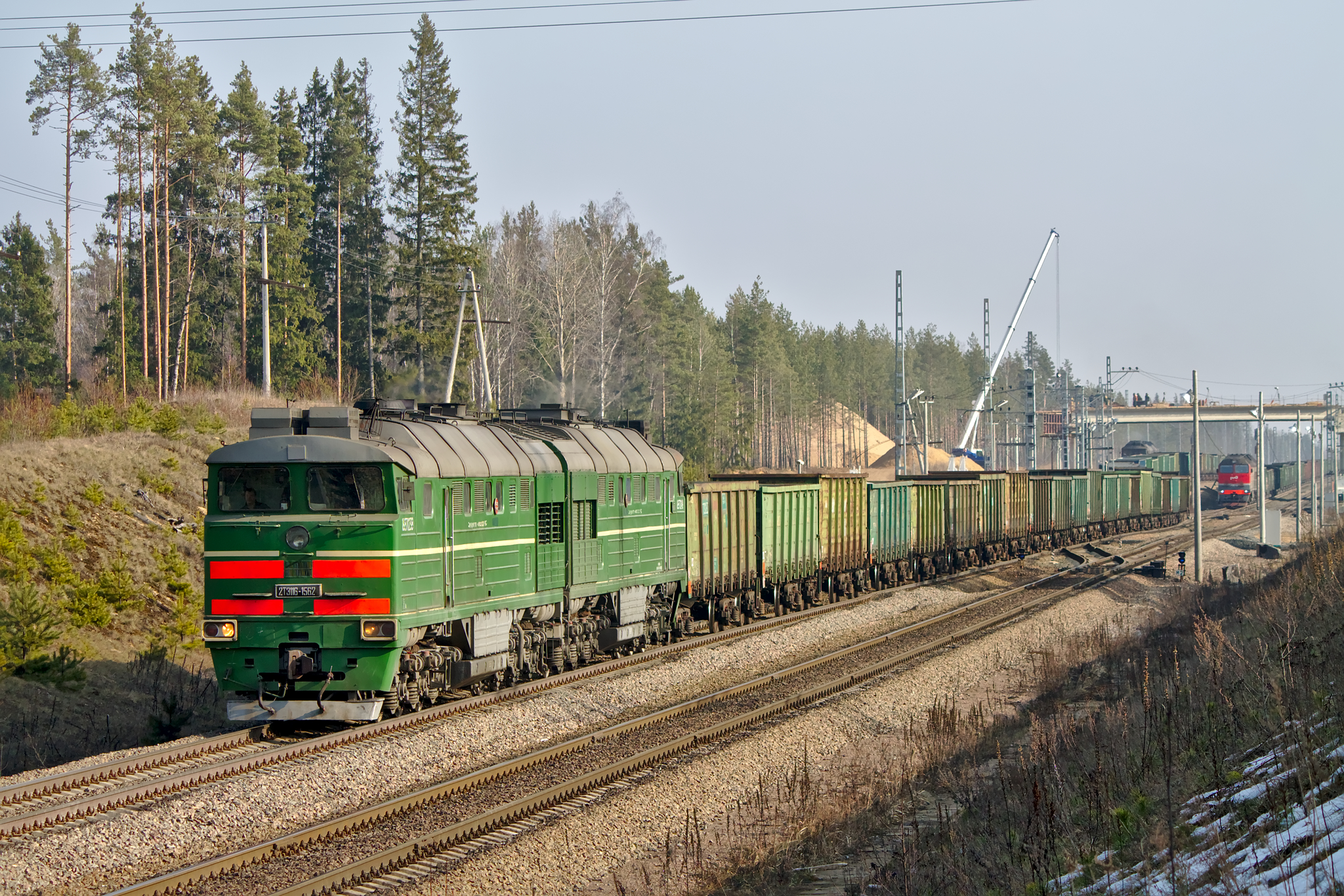 2ТЭ116-1562, станция Котлы-2. см. фото 584187 в альбоме автора